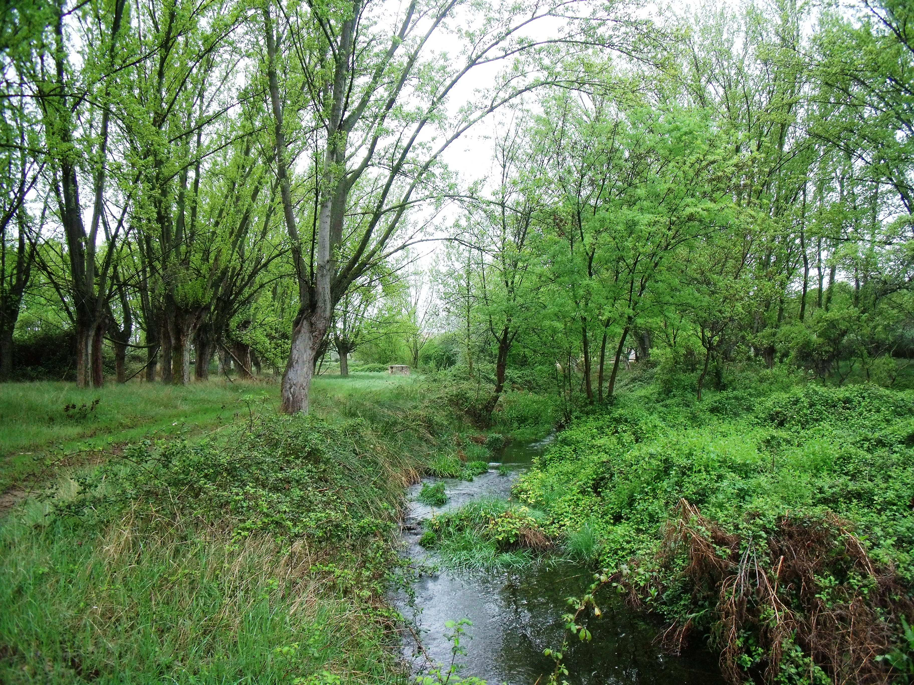 Río_Moyuela — Arboleda de la Tejería en Plenas, Zaragoza.